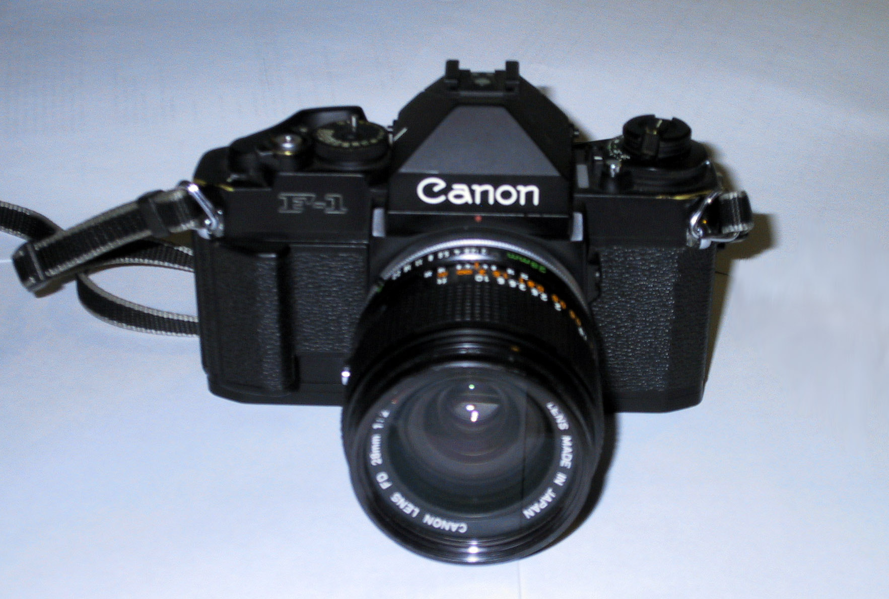 Canon new F-1.